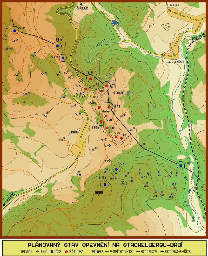 CS - Stachelberg, mapa